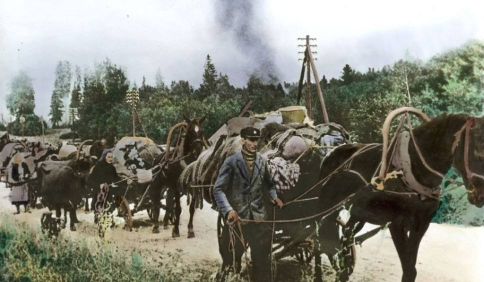 Wysiedlenia Niemców